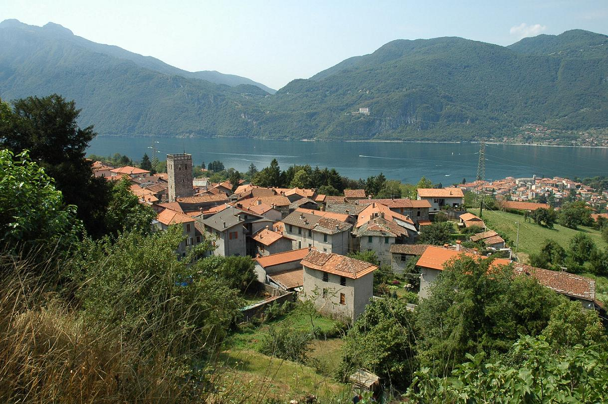 La frazione di Maggiana con la torre di Federico Barbarossa